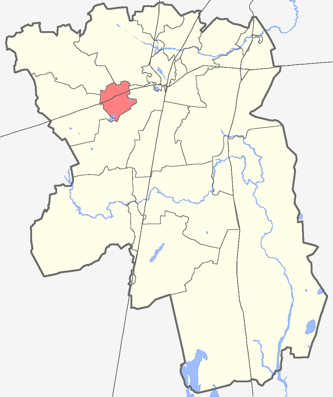 Войсковицкое сельское поселение на карте Гатчинского района